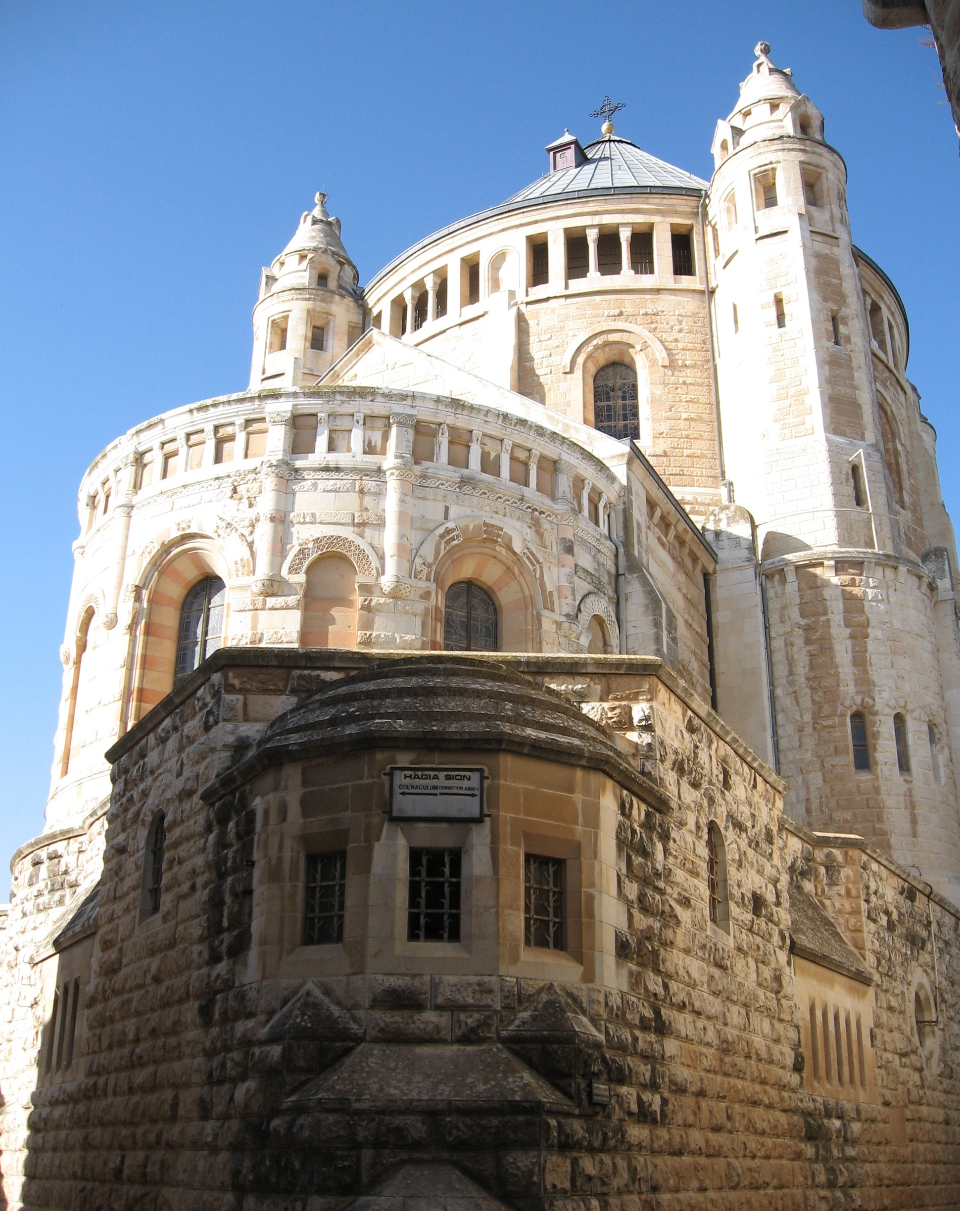 Die Dormitio-Kirche auf dem Mount Zion